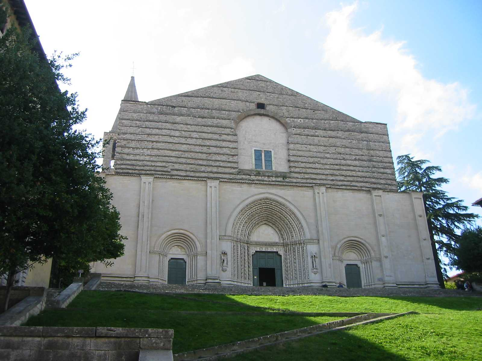 San Fortunato in Todi. Fotografiert im September 2004 von Fantasy :-)